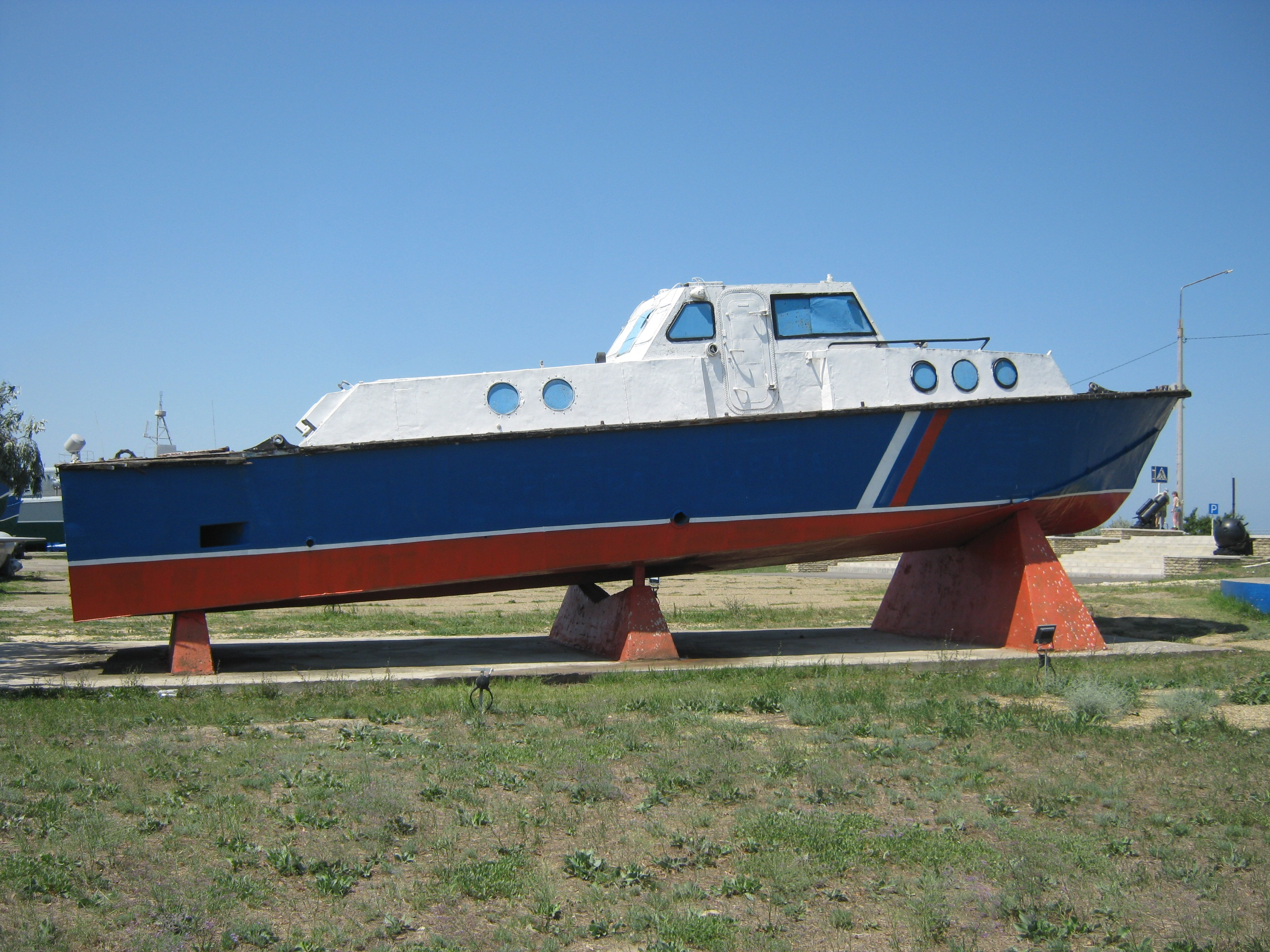 Военная горка (Темрюк)